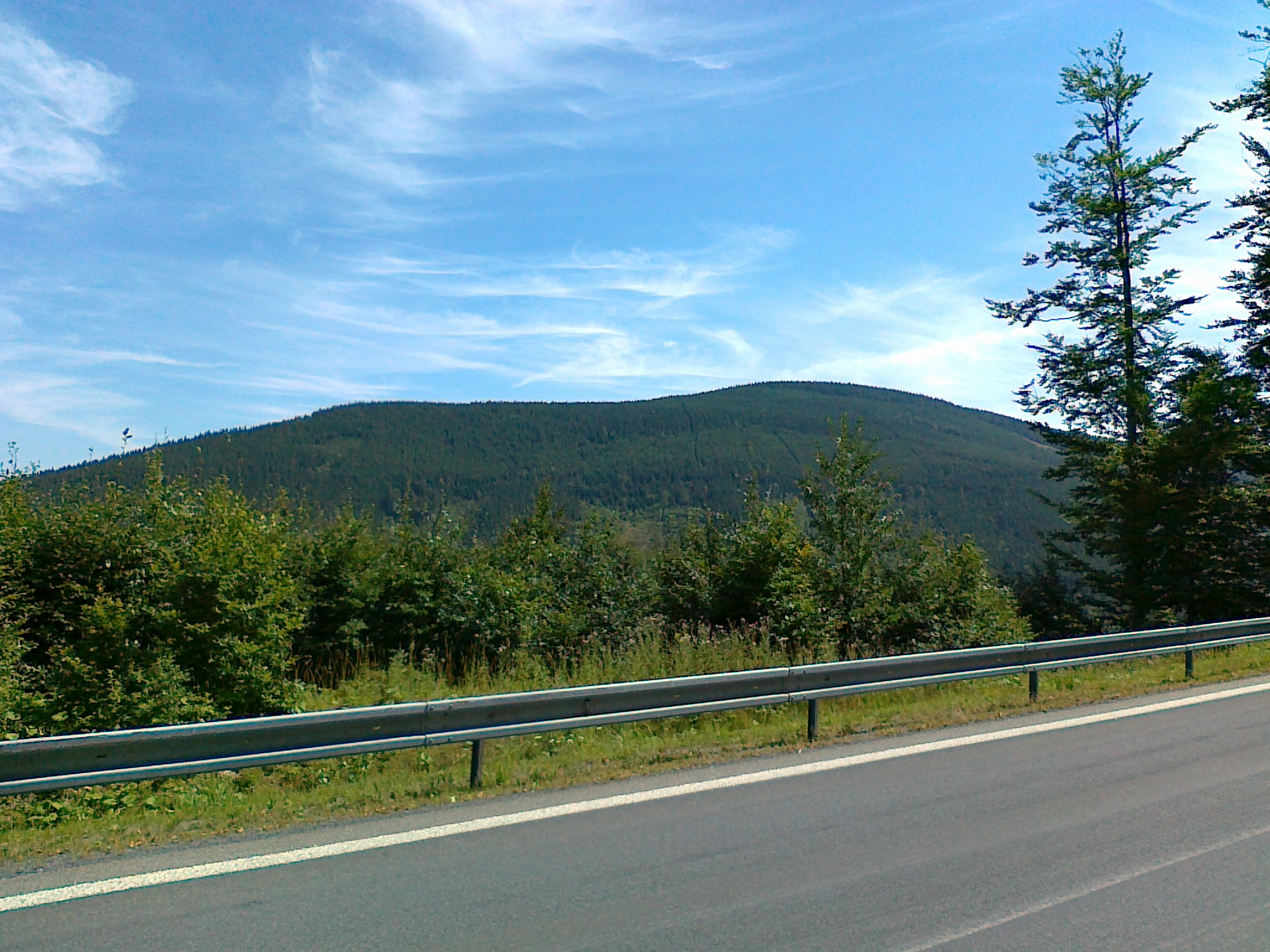 Widok z drogi nr 44 na szczyty Jeřáb - 1077 m i Velký Klín - 1178 m